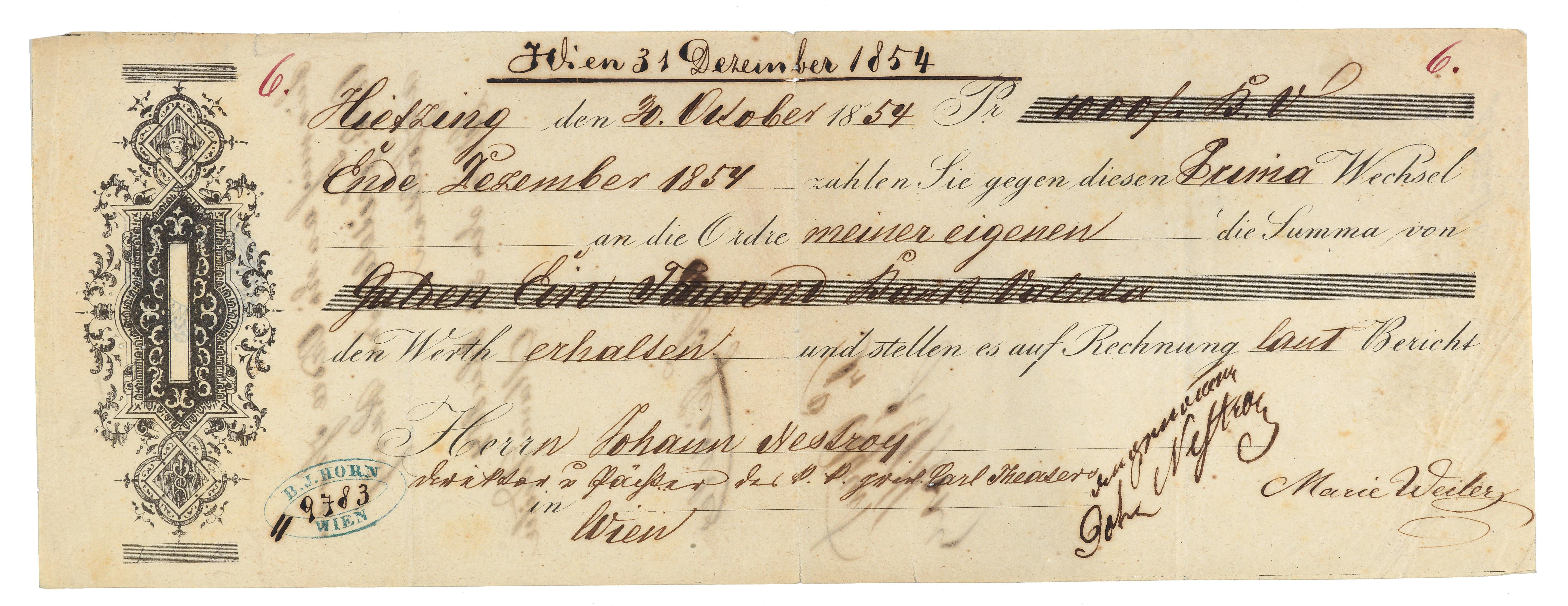 Wechsel auf die Summe von 1000 Gulden Bank Valuta, ausgestellt auf Johann Nestroy als Direktor und Pächter des k. k. privilegierten Carl Theaters. Unterschrieben: "angenommen Johann Nestroy", Wien, 31. 12. 1854, gedr. Formular, Stempel B. J. Horn, Wien